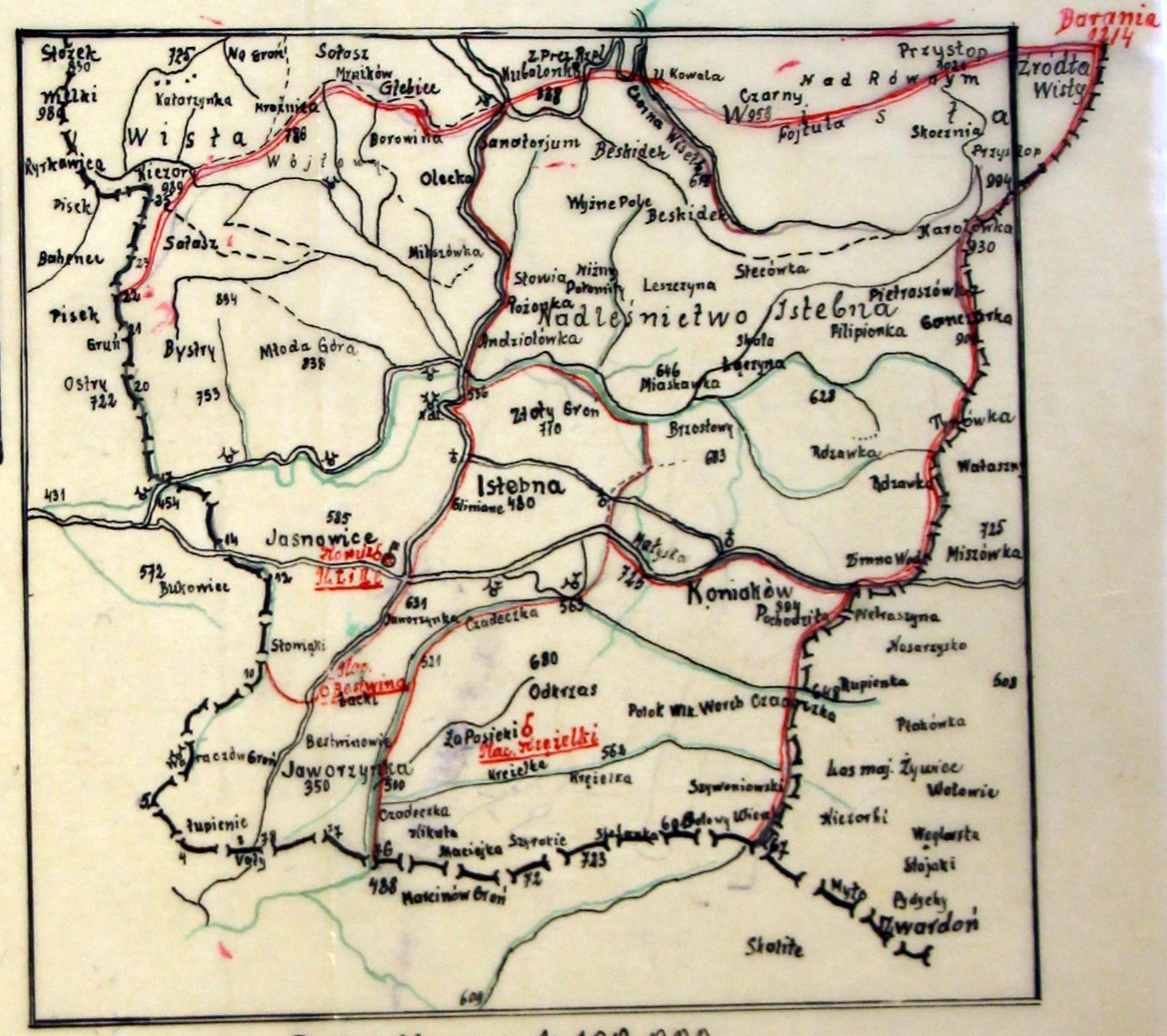 Szkic komisariatu SG Istebna - lata 30. XX wieku